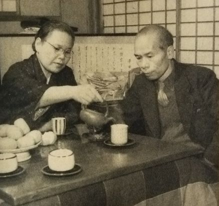 壺井栄・繁治夫妻